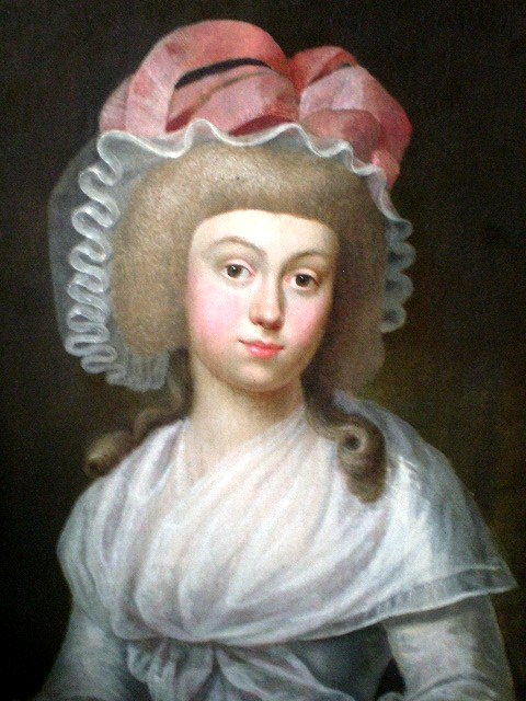 Cornelia Jacobine von Steengracht, verheiratete Gräfin von der Goltz, ihr Mann war Wilhelm Bernhard von der Goltz zeitweise preußischer Gesandter in St. Petersburg.